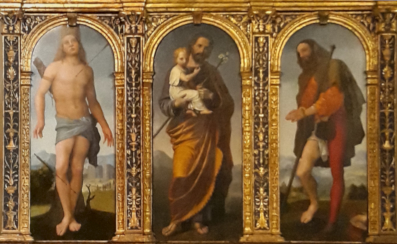 Polittico presso altare laterale della chiesa di San Giorgio in Braida a Verona. A sinistra, "San Sebastiano" di Giovan Francesco Caroto, in centro "San Giuseppe" di Recchia e a destra "San Rocco", Giovan Francesco Caroto